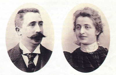 Josef Cohen (1860-1924) und Rosa Wittgenstein (1867-1949)